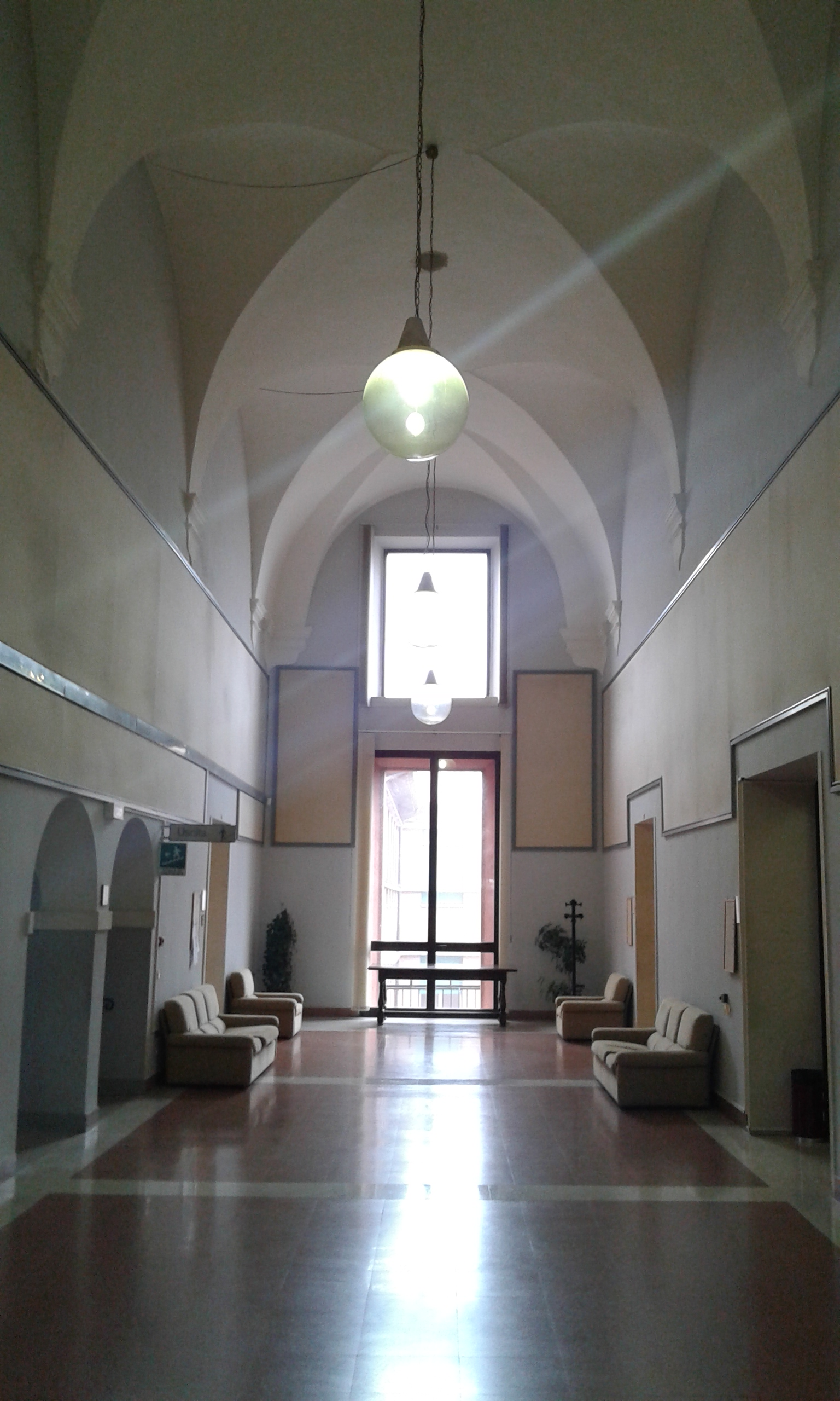 Corridoio 2° piano Giudici Civili